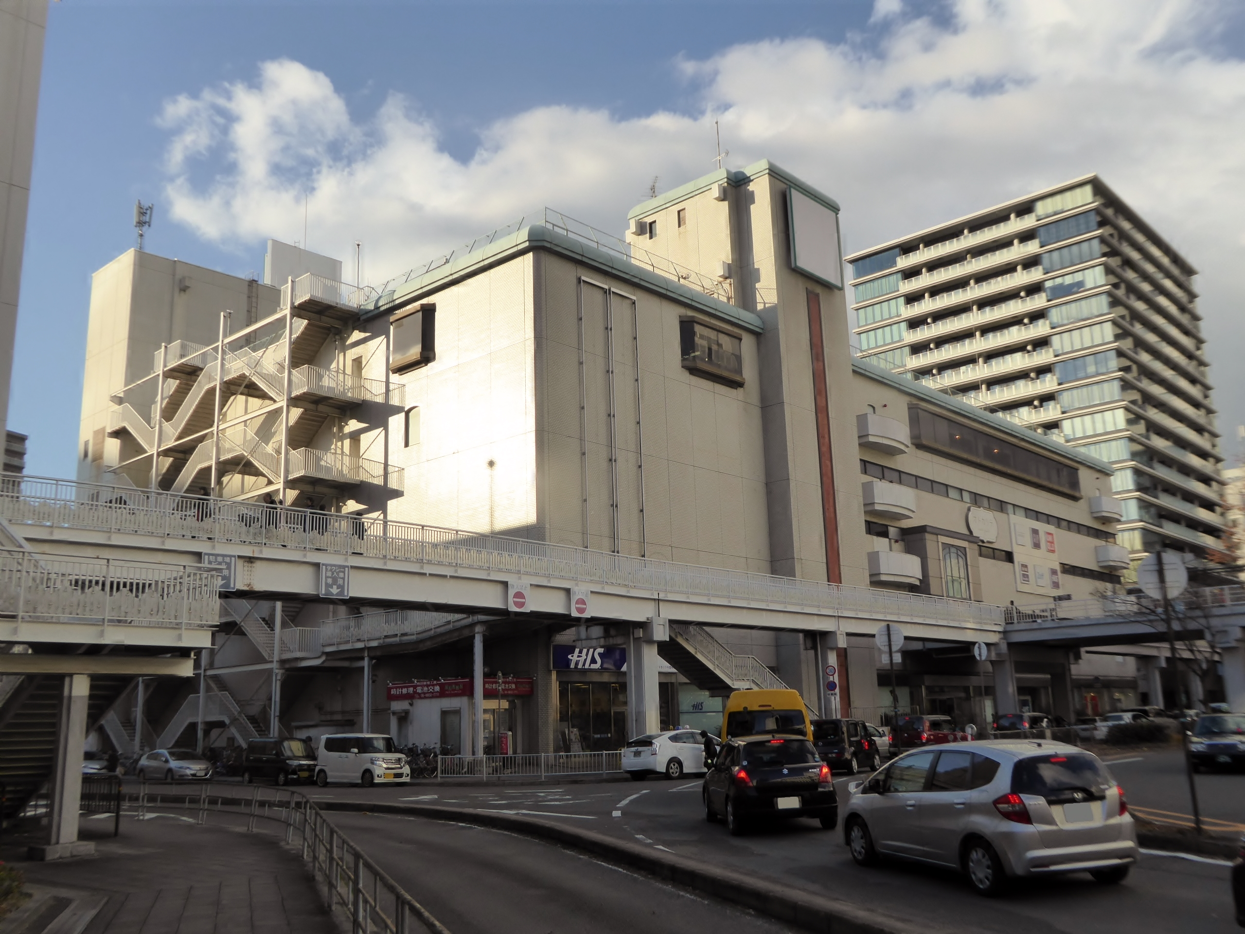 2016年12月23日時点のオトカリテを撮影。